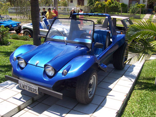 Kadron: Genuinamente Brasileiro.